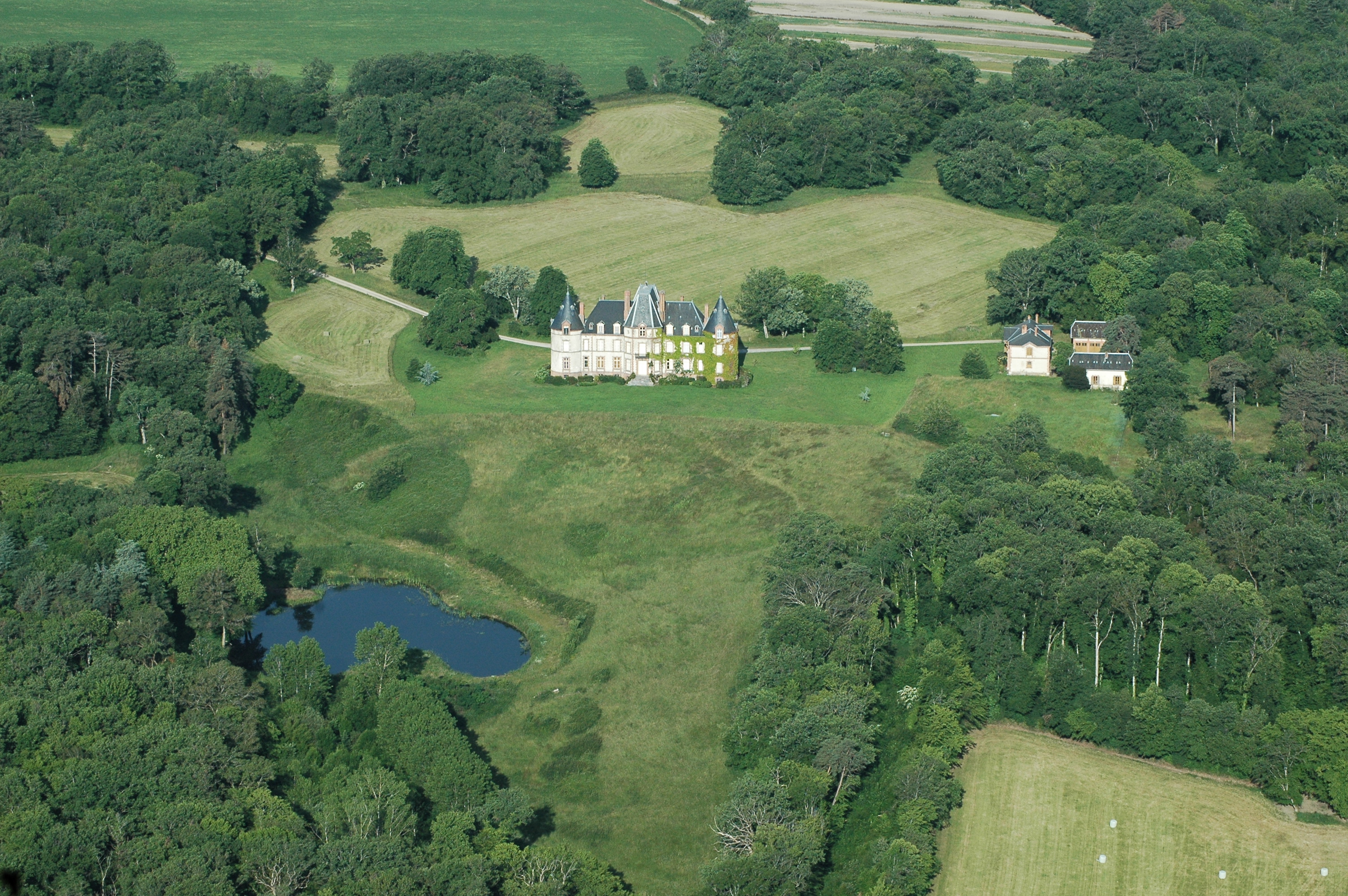 Le château du Bostz à Besson, Allier, France.